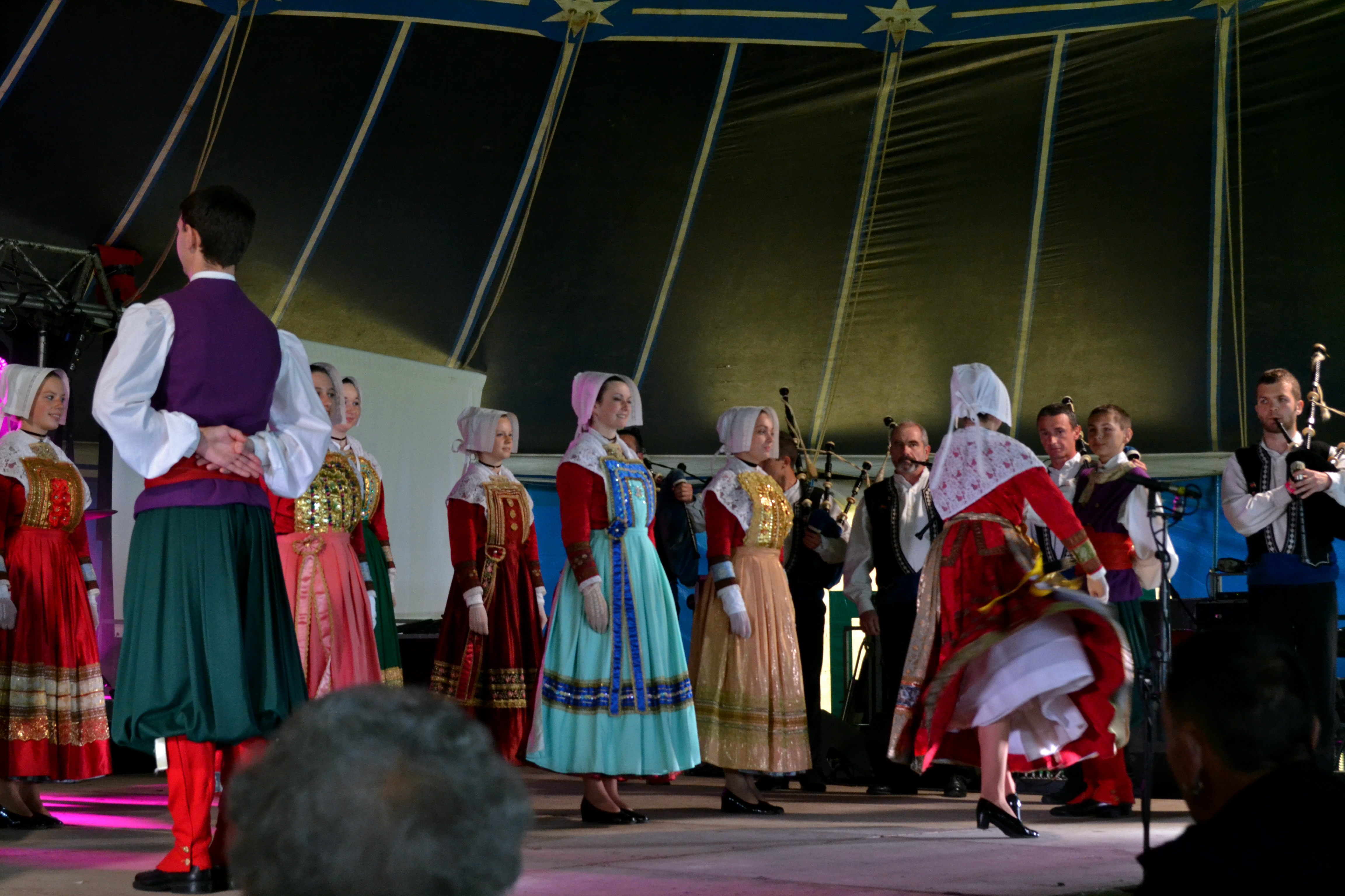 Le bagad Landi accompagné par l'ensemble Bleuniadur au Gouel Bro Leon à Plouvorn le 16 juin 2013.